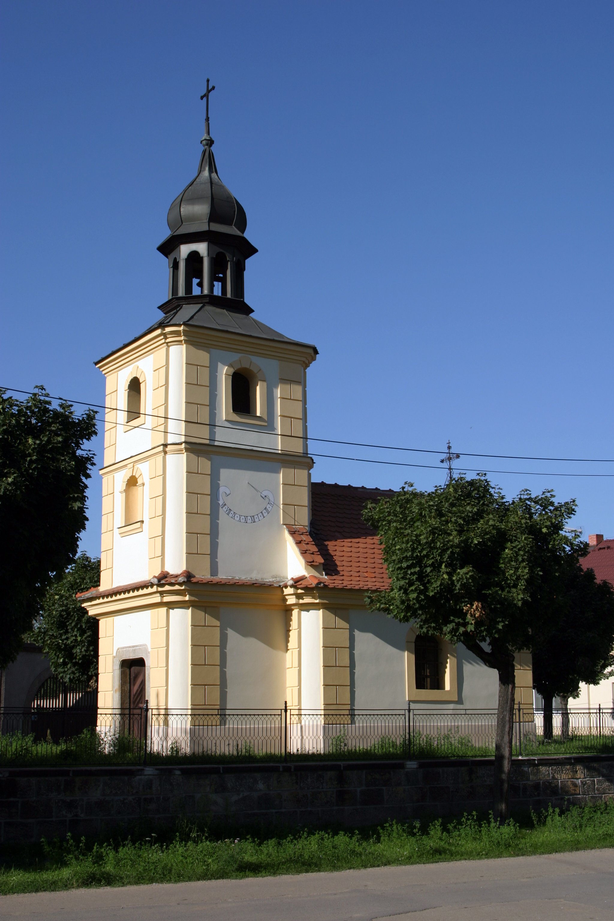 Kaplička se slunečními hodinami v Sedlčánkách